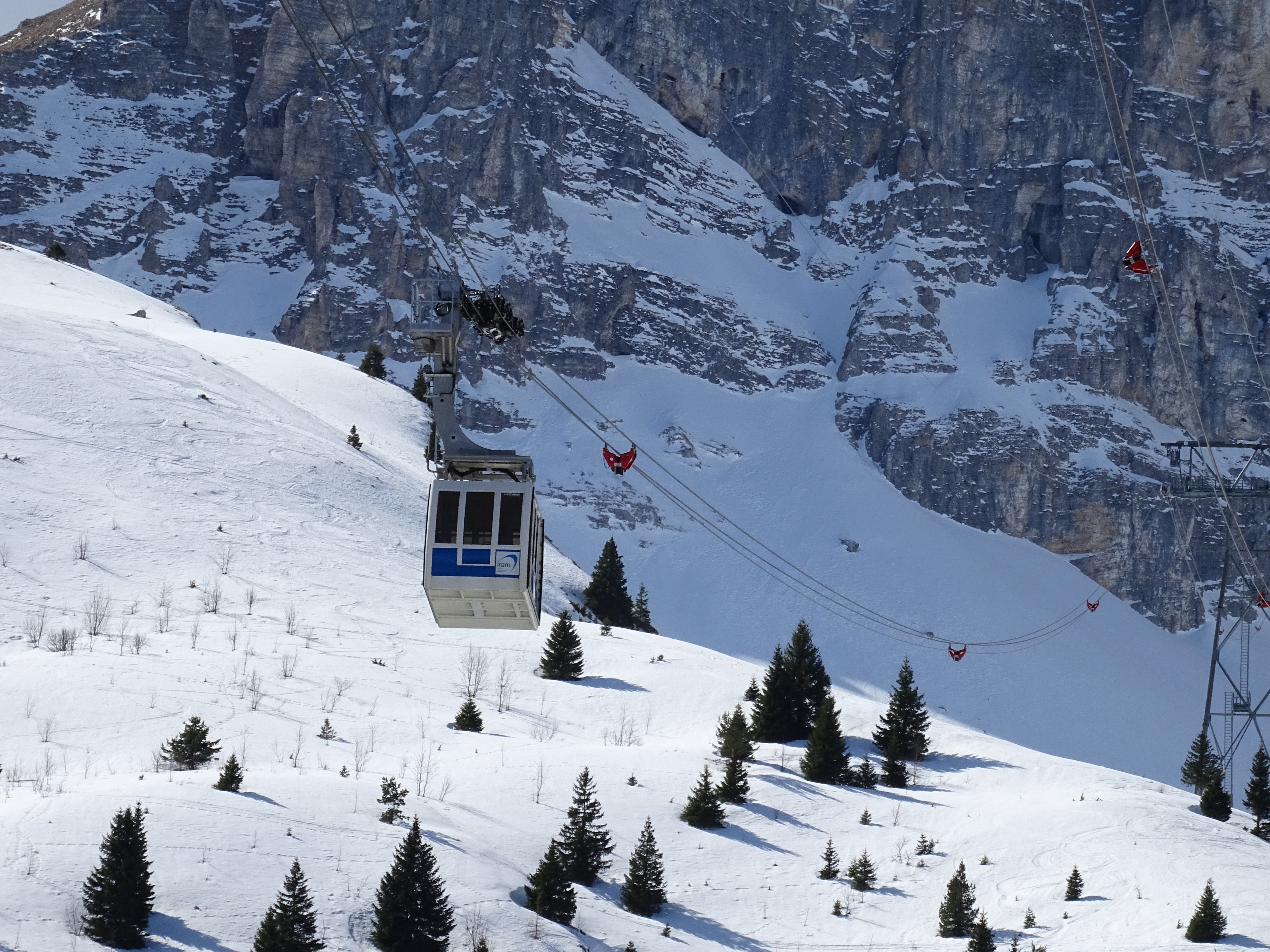 Nouveau téléphérique de Bure déraillé en 2017, vue de la cabine et du P2. Les cables monte-charge déraillés à droite.